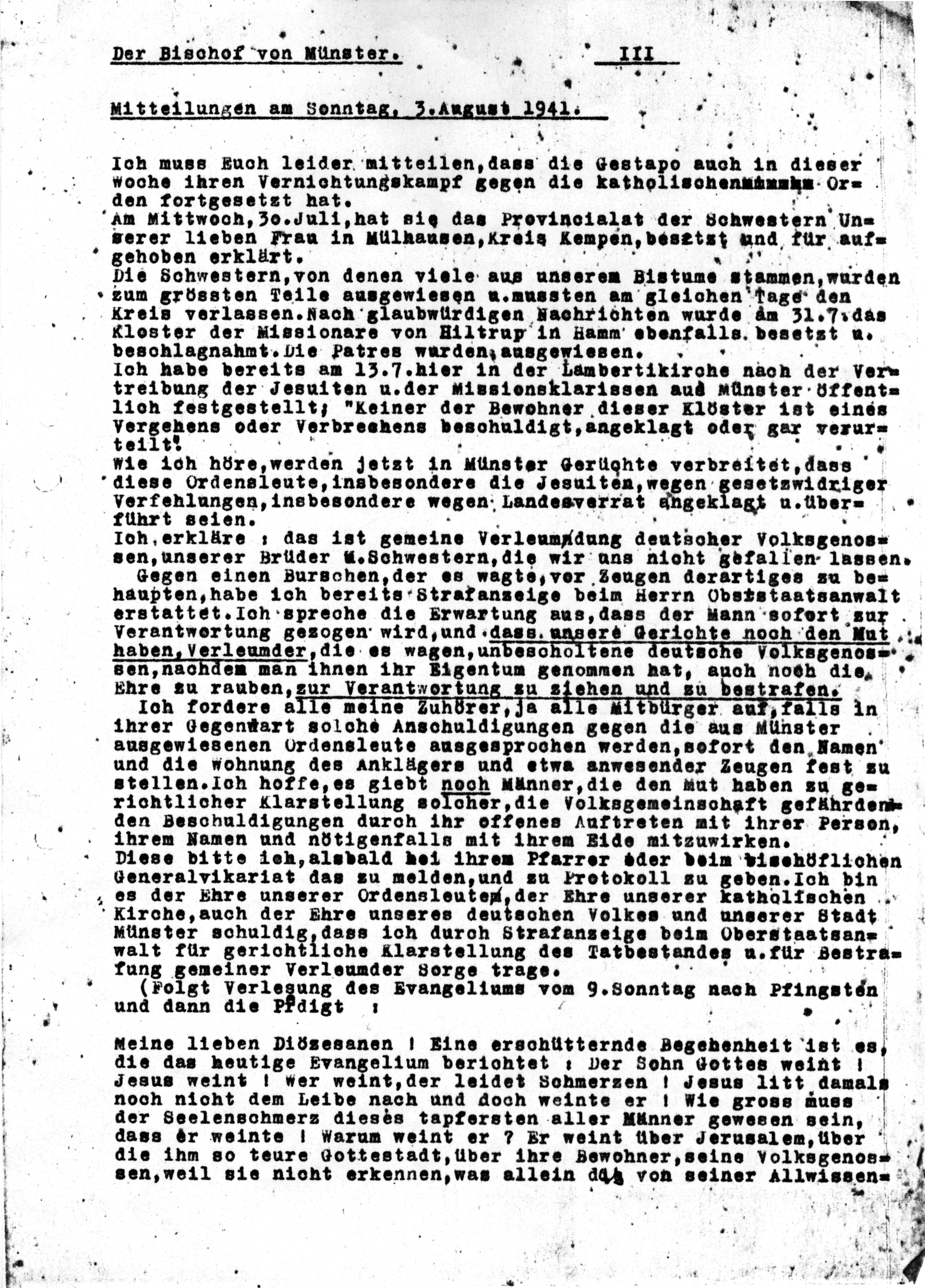 Seite 1 der Abschrift einer Predigt des Bischofs von Münster vom 3. August 1941 wie sie damals vielfach in katholischen Kreisen kursierte. Diese ist die Kopie von einem Original, das ich 1998 im Privatarchiv eines alten katholischen rheinländischen Pfadfinders (DPSG), der einer während der NS-Zeit illegalen Gruppe angehörte, einsehen konnte.